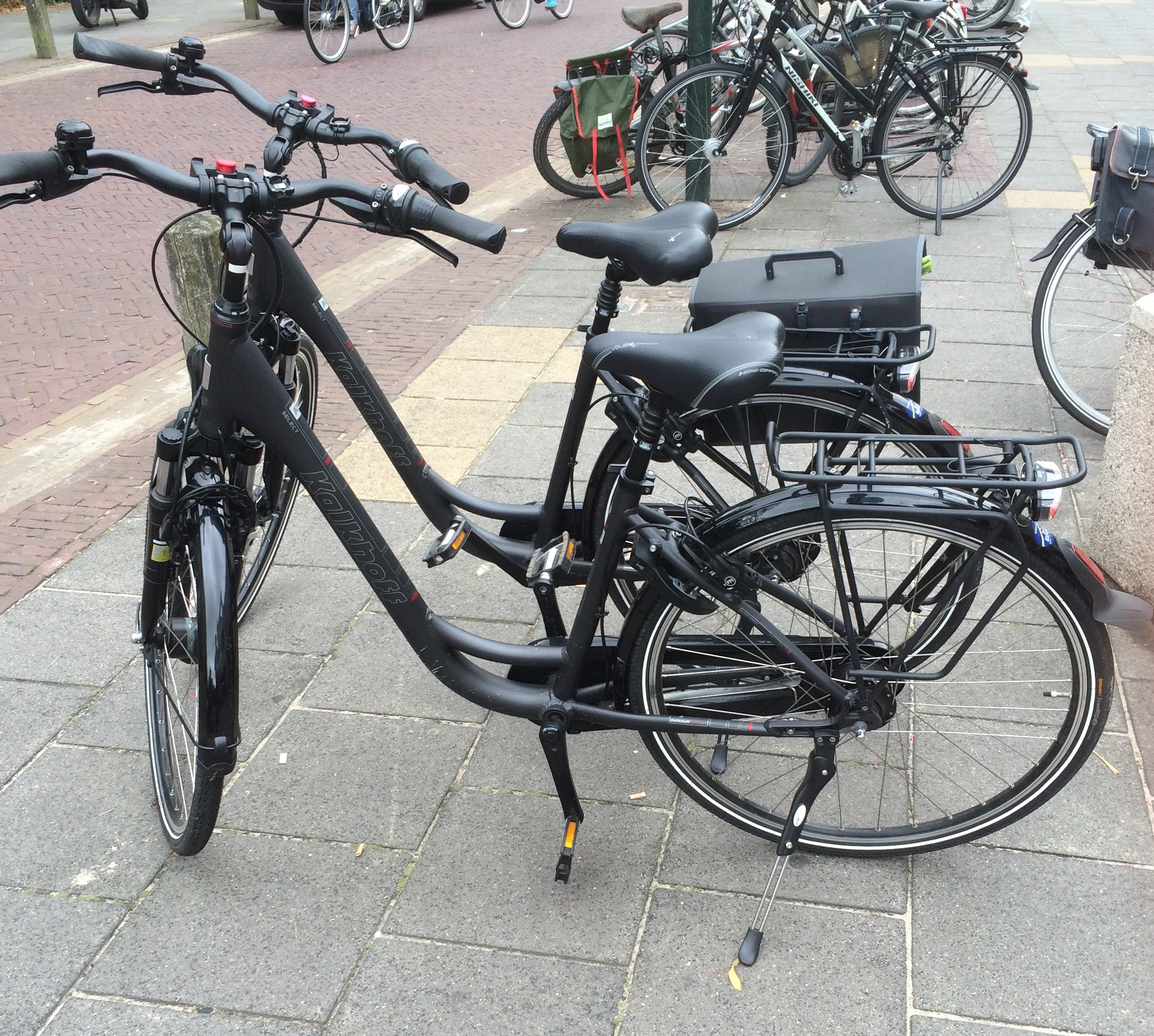 Kalkhoff Fahrräder